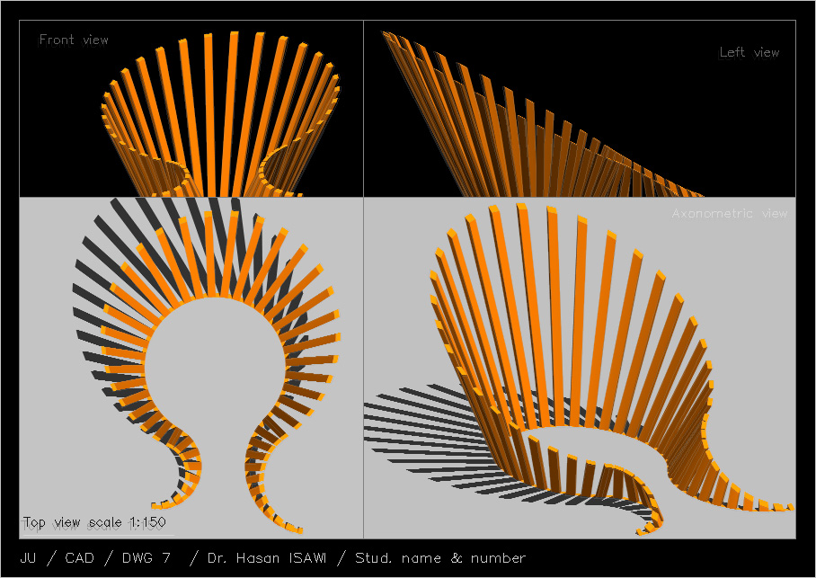 لوحة 8: نمذجة واظهار سطح مسطر بطريقة مشابهة لمشروع galleria vedeggio cassarate